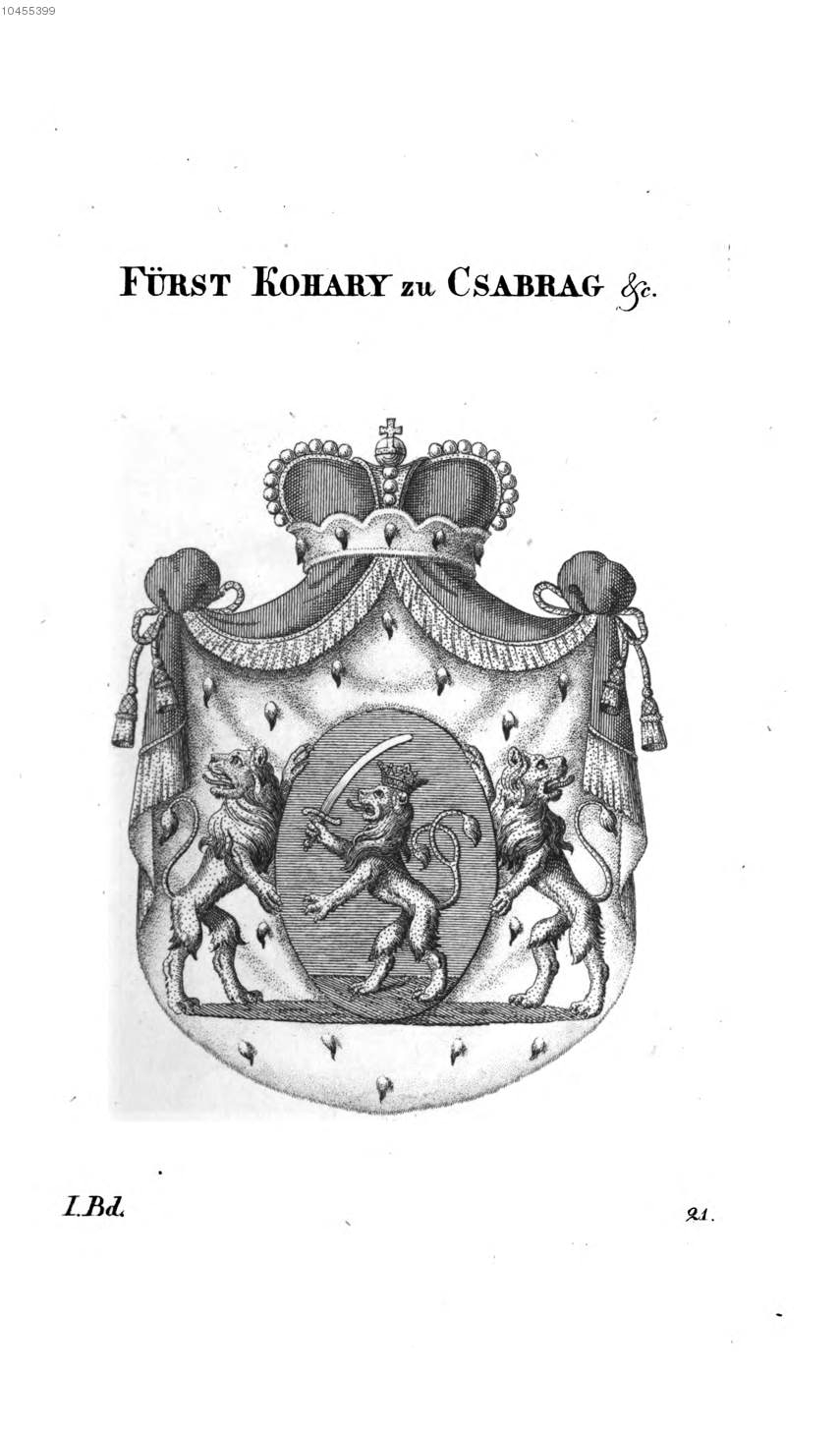 Wappen Kohary zu Csabrag - Tyroff AT.jpg